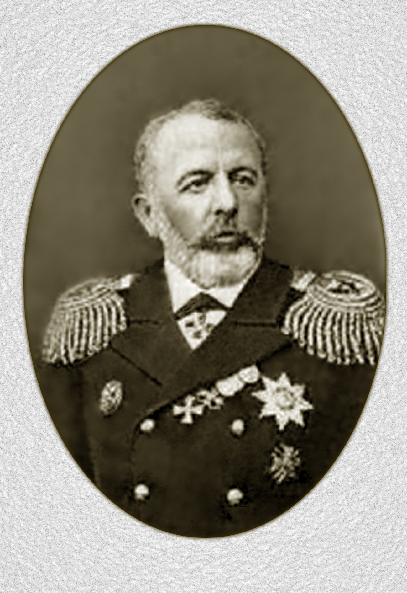 контр-адмирал Кумани Михаил Николаевич